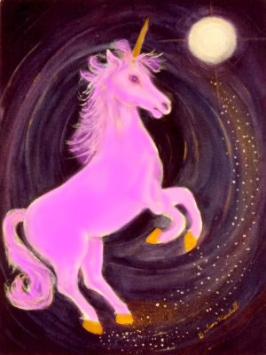 Aquarela original de Barbara Marshall editada editada por Tutakamime em 1/4/2007